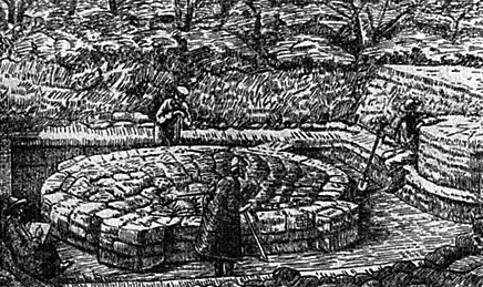 Изображение раскопок "храма Кия"